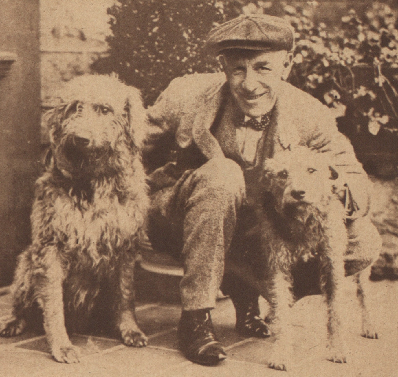 Edward Bok